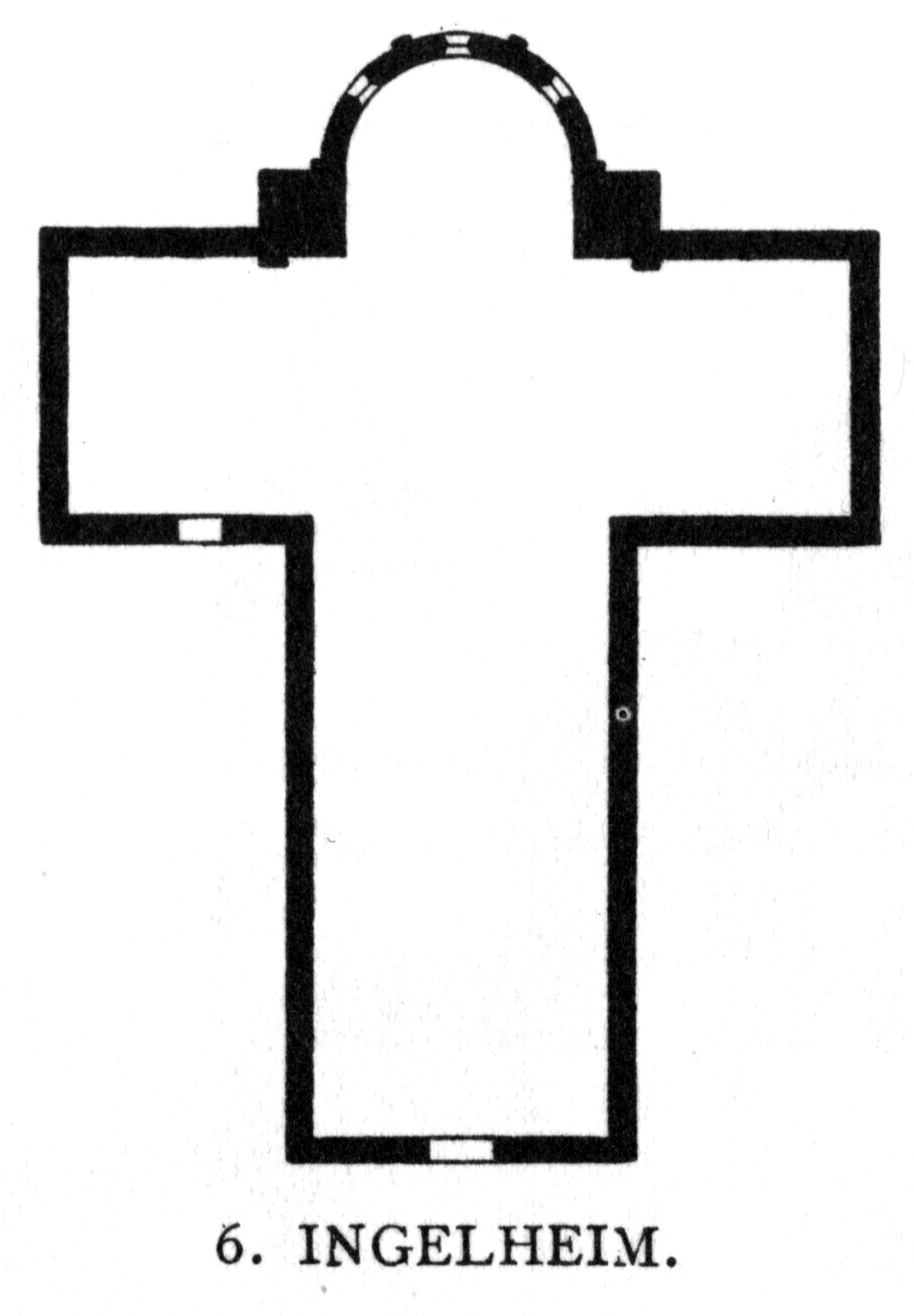 Ingelheim, Palastkirche (?). Floor plan.